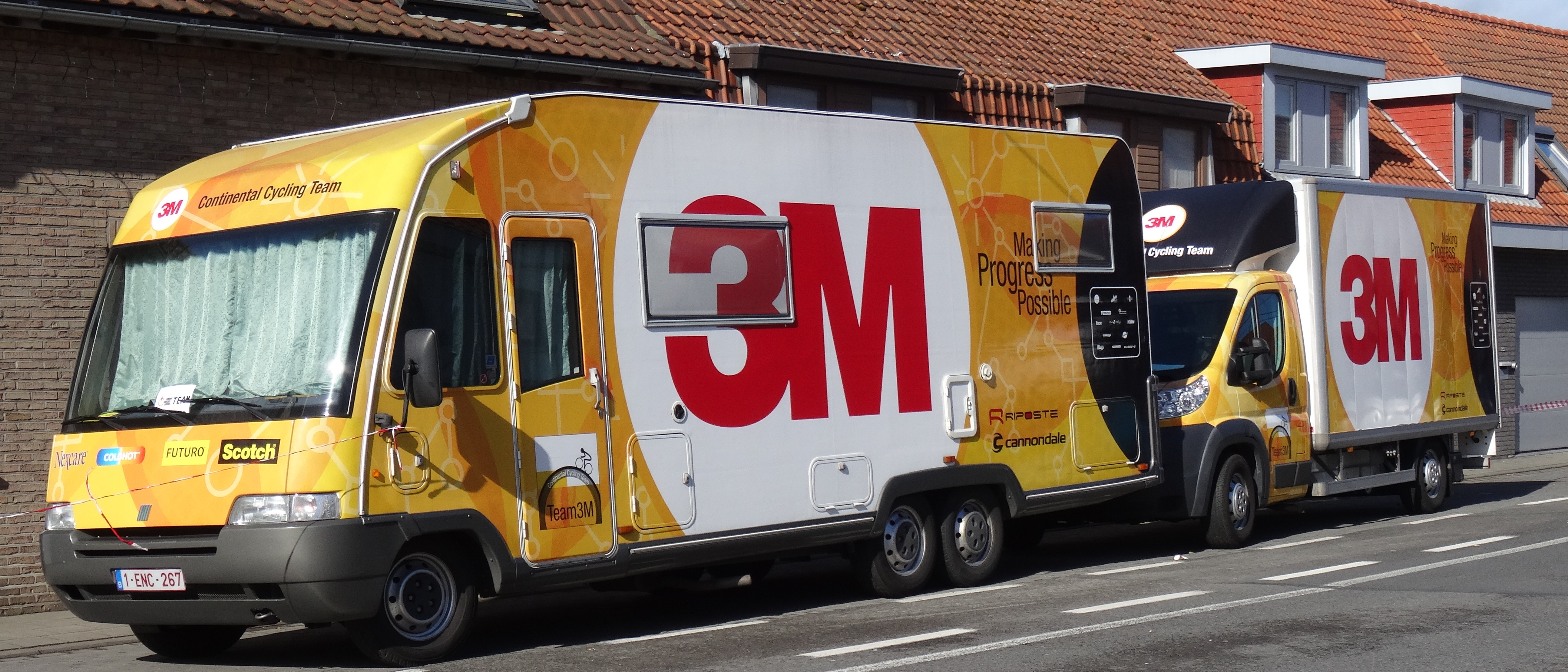 Reportage réalisé le dimanche 1er mars à l'occasion du départ et de l'arrivée de Kuurne-Bruxelles-Kuurne 2015 à Kuurne, Belgique.